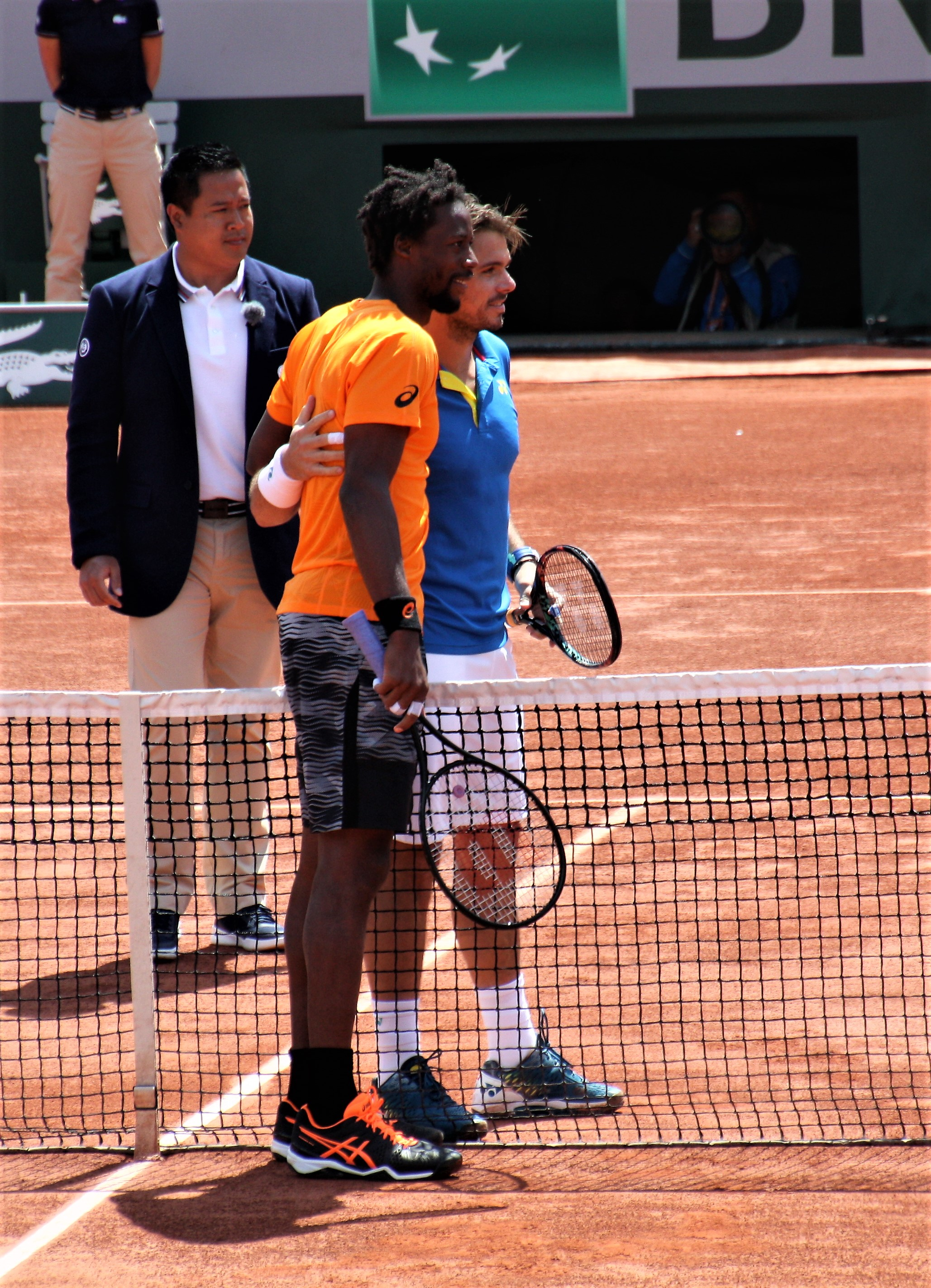 Gael Monfils lors des huitièmes de finale contre Stan Wavrinka